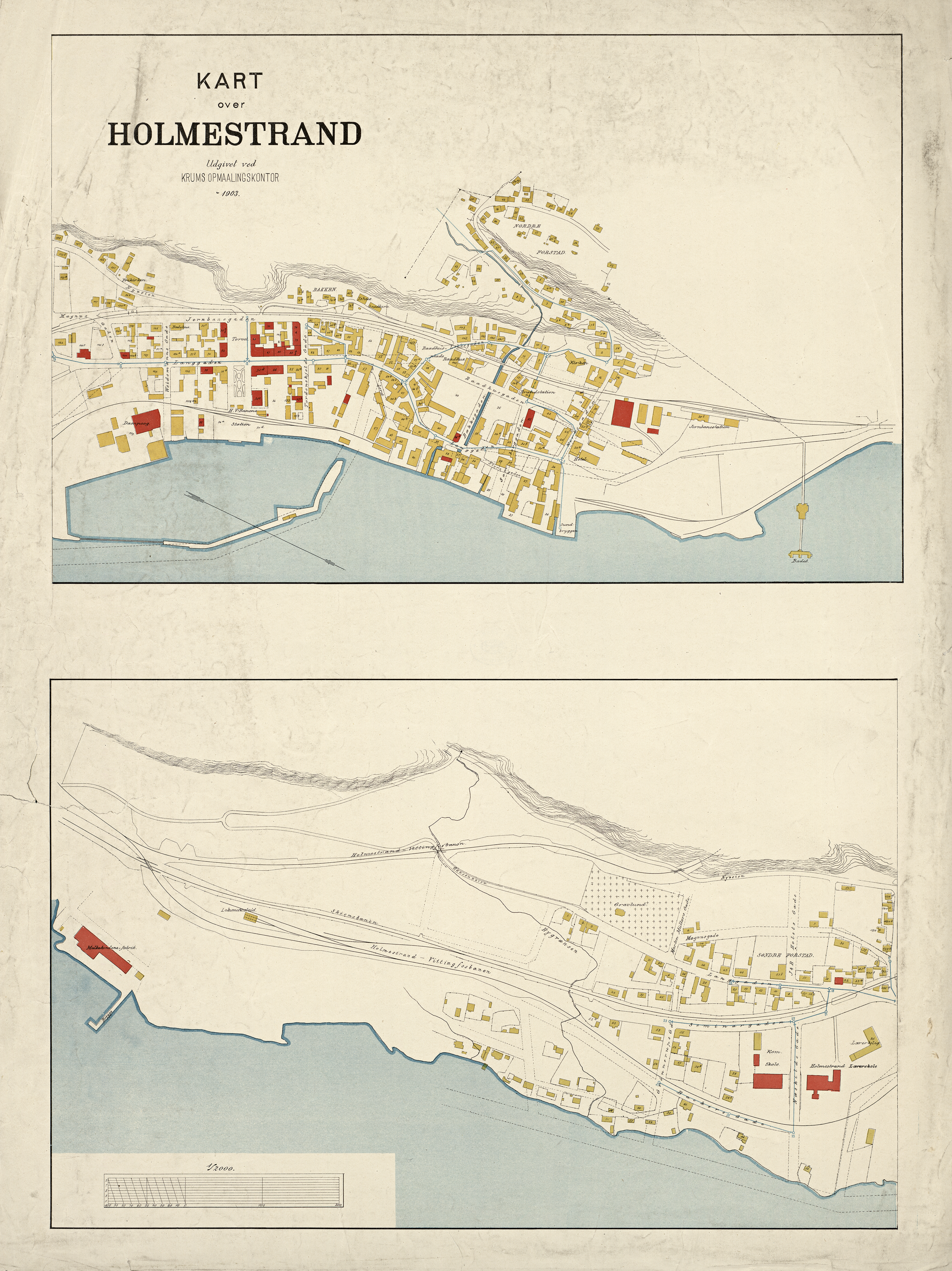 NS Krums kart over Holmestrand fra 1903.